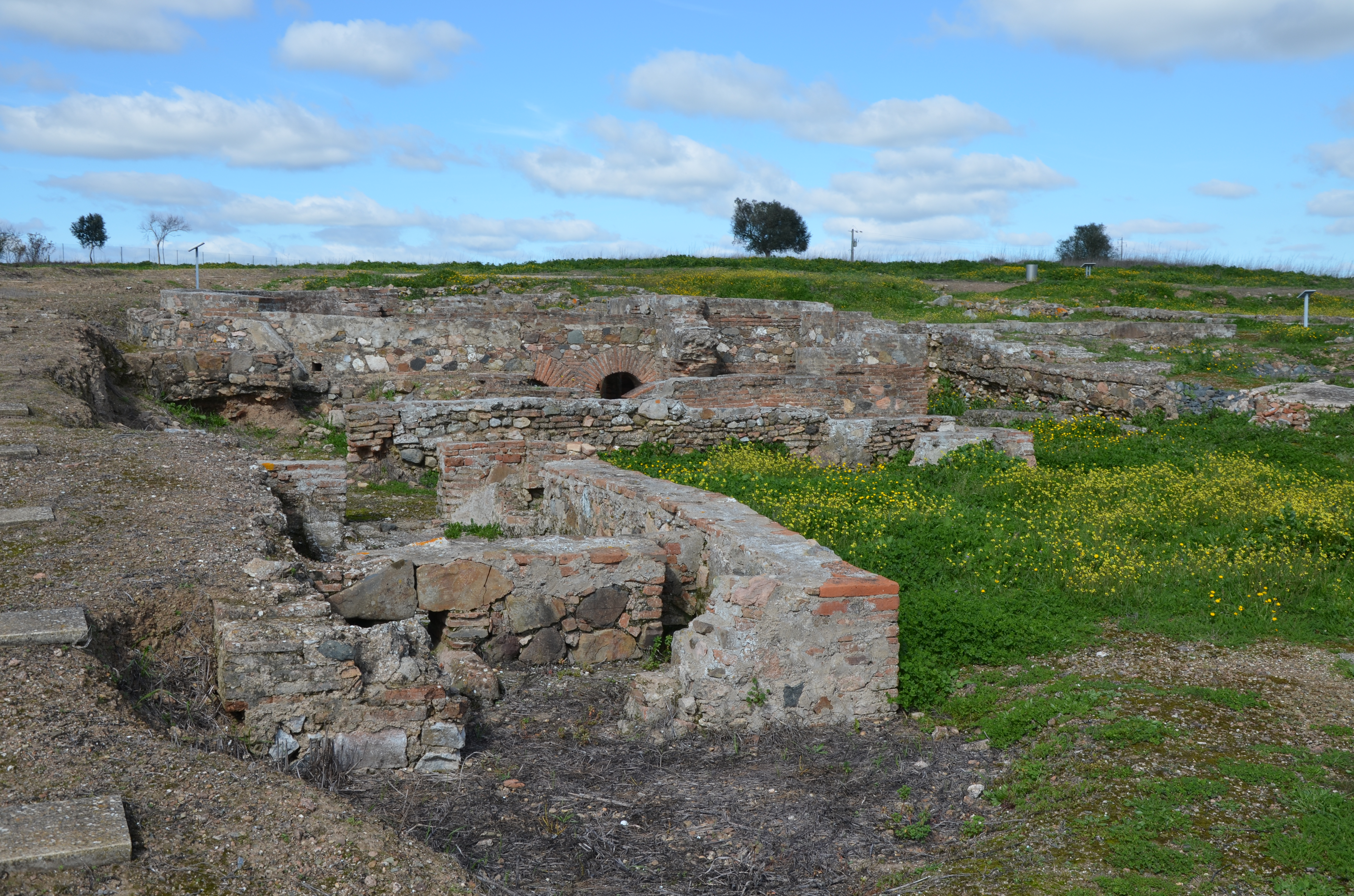 Roman Villa of Pisões, Portugal Roman villa, Pisões